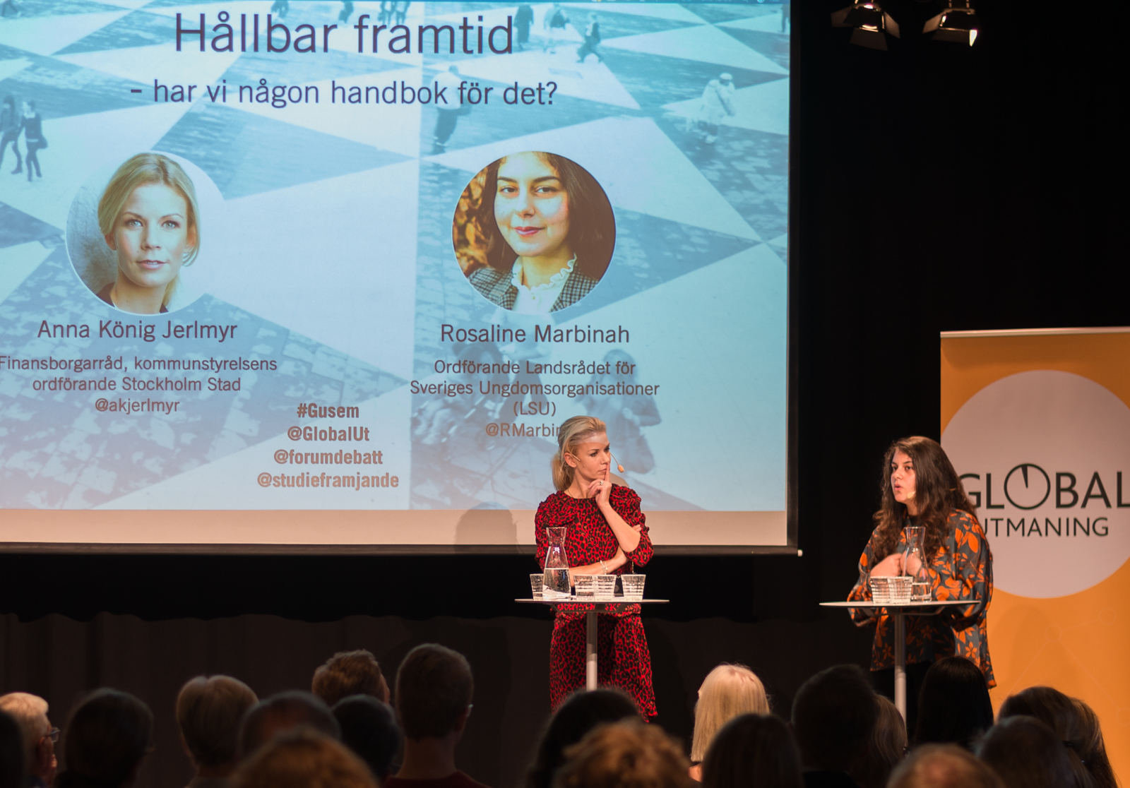 Anna König Jerlmyr och Rosaline Marbinah debatterar "Hållbar framtid" på Kulturhuset Stadsteatern i Stockholm den 7 november 2018.